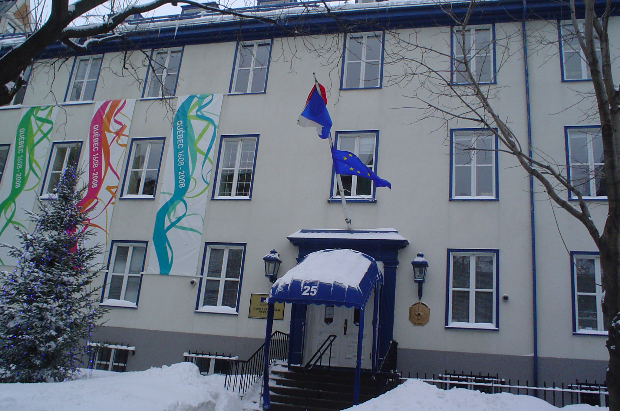 Consulat général de France à Québec french consulate quebec